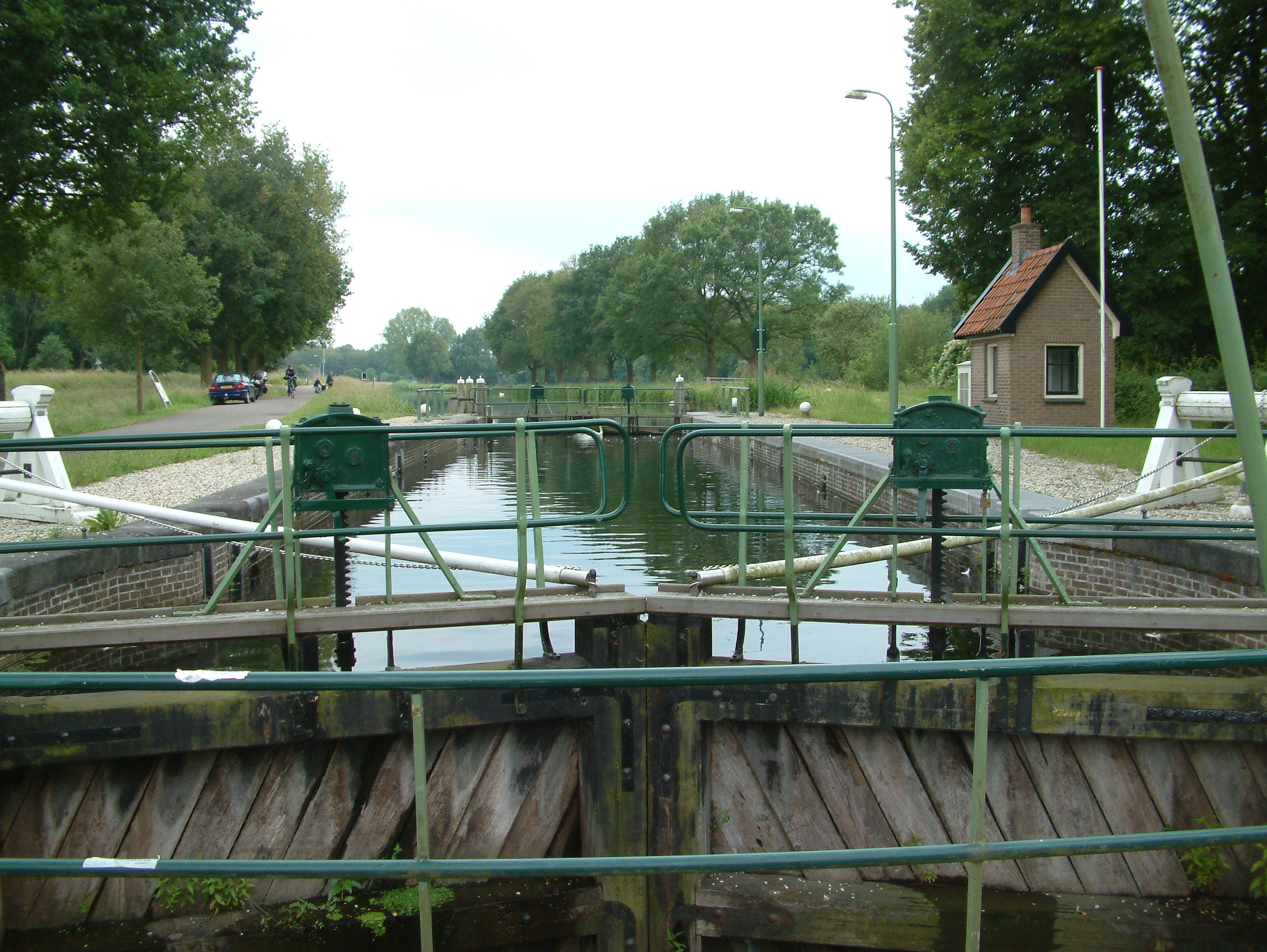 Sluis in het Apeldoorns kanaal van Dieren naar Hattem